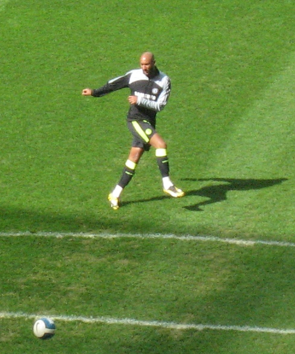 Nicolas Anelka